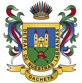 Éste es el escudo oficial del municipio